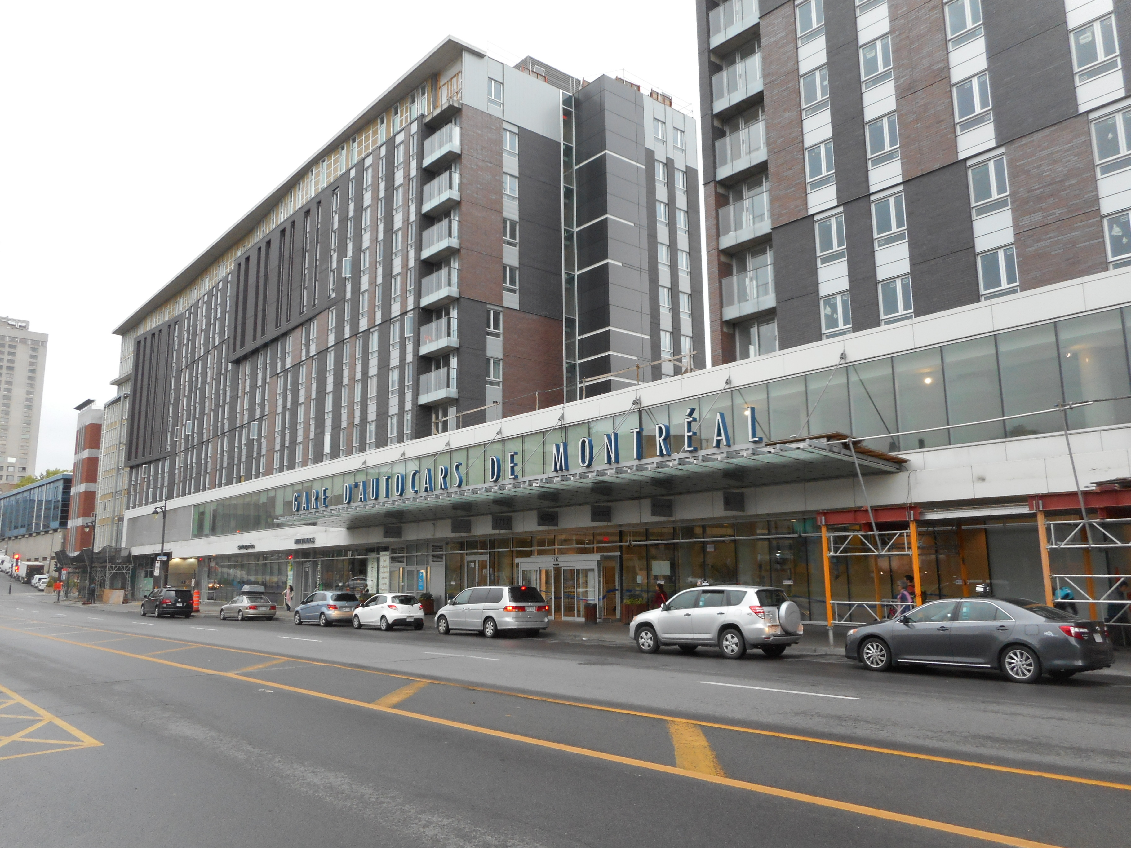 Gare d'autocars de Montréal, 1717, rue Berri